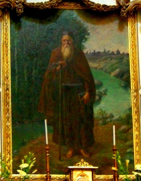 Immagine di San Corrado sopra l'altare laterale della Cattedrale di Noto